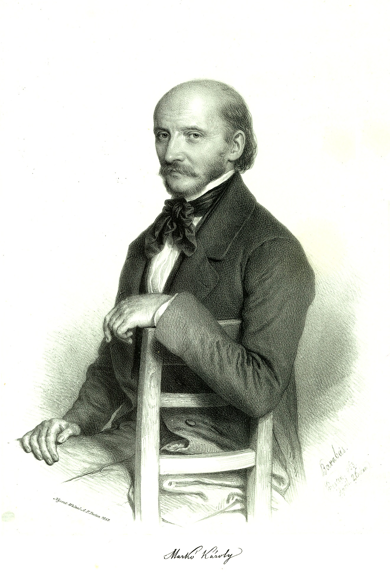 id. Markó Károly (Lőcse, 1793. november 23.[1] – Villa di Lappeggi, Itália, 1860. november 19.) magyar festő, 1840-től a Magyar Tudományos Akadémia tagja. id. Markó Károly neve a magyar művészettörténetbe, mint a tájképfestészet megteremtője vonult be.